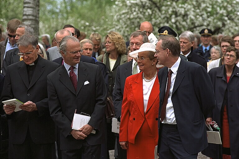 Invigningen av Historiskt centrum vid Uppsala högar. Kungen och andra inbjudna gäster. Motiv: Gamla Uppsala - historiskt centrum Nyckelord: Raä-Fastigheter Kategori: Museum Invigningen av Historiskt centrum vid Uppsala högar. Kungen och andra inbjudna gäster.